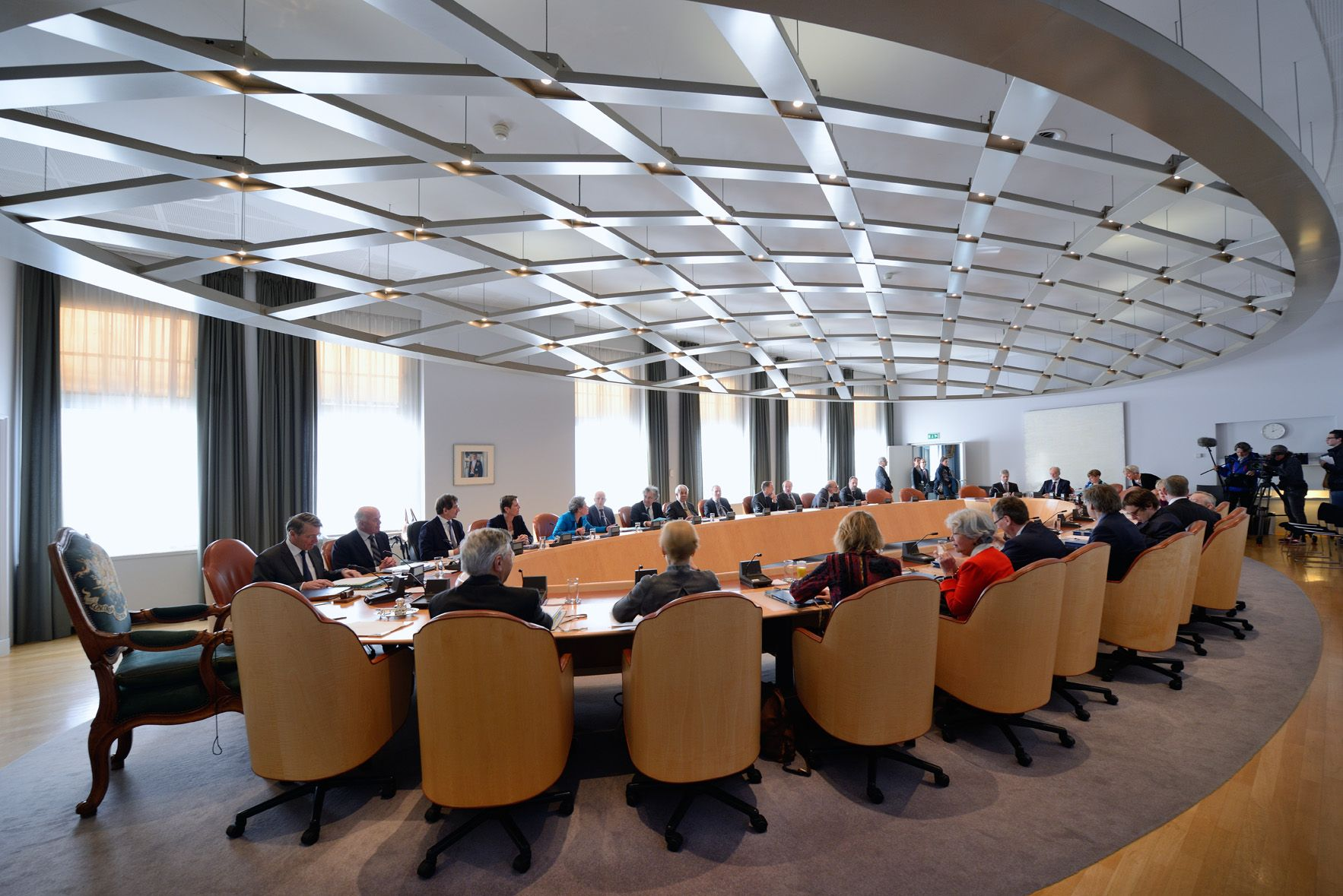 Raad van State vergaderzaal aan het Binnenhof